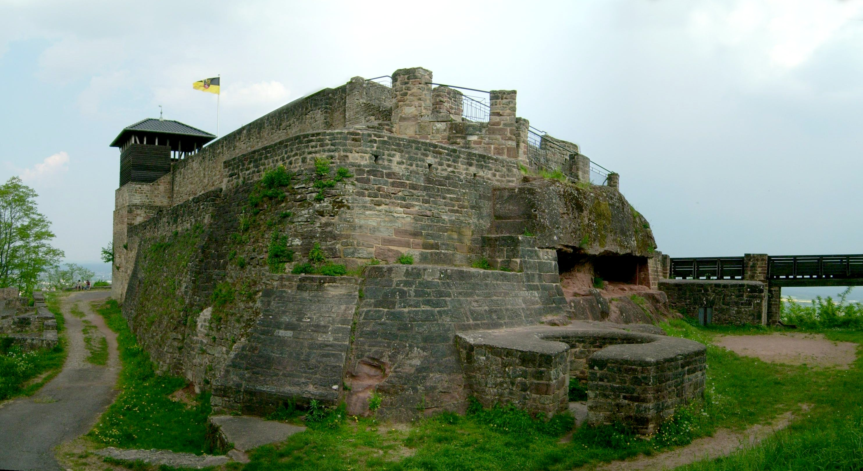 Teufelsburg (Blick vom Zugang)